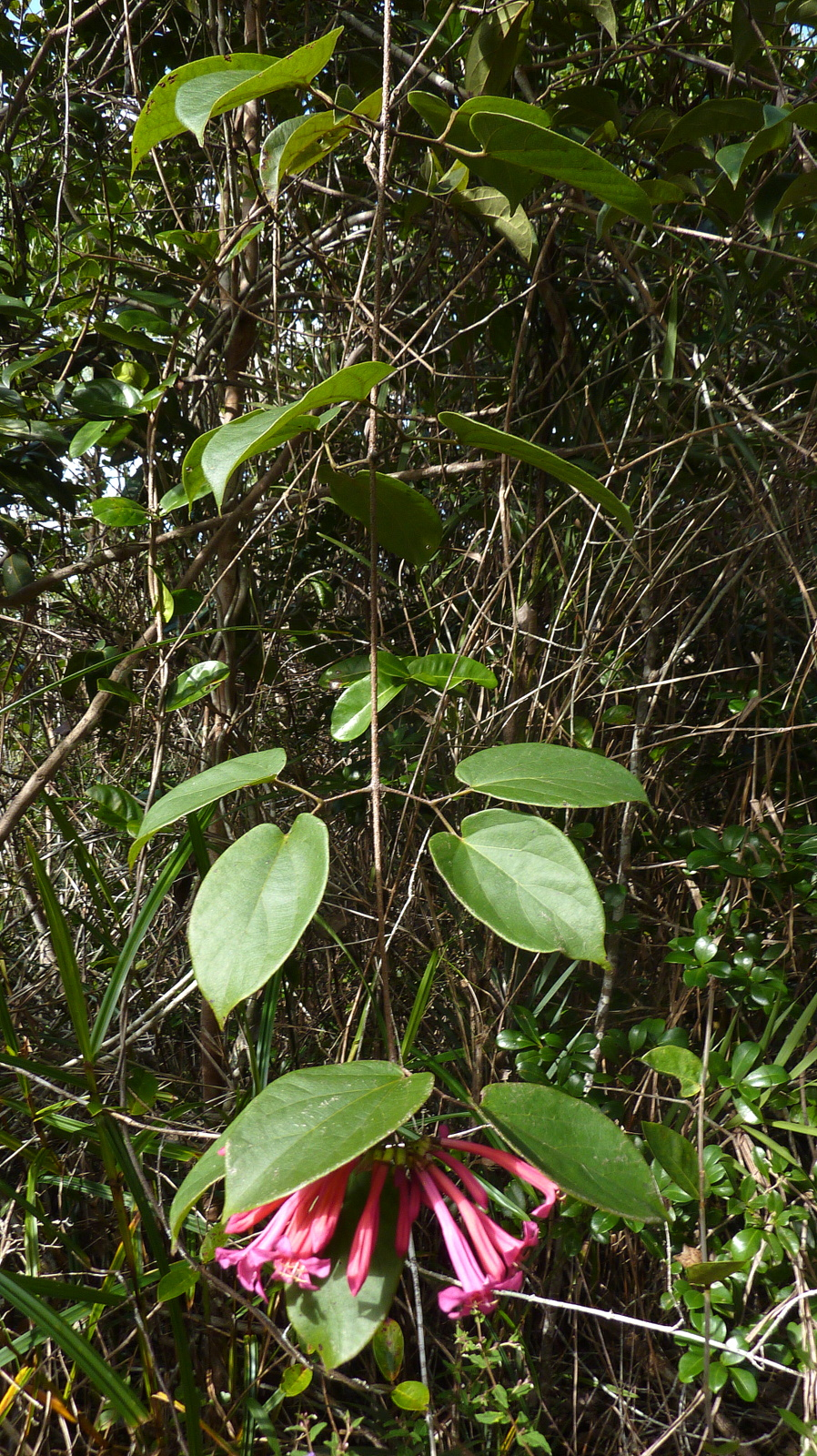 Lundia cordata (Vell.) DC